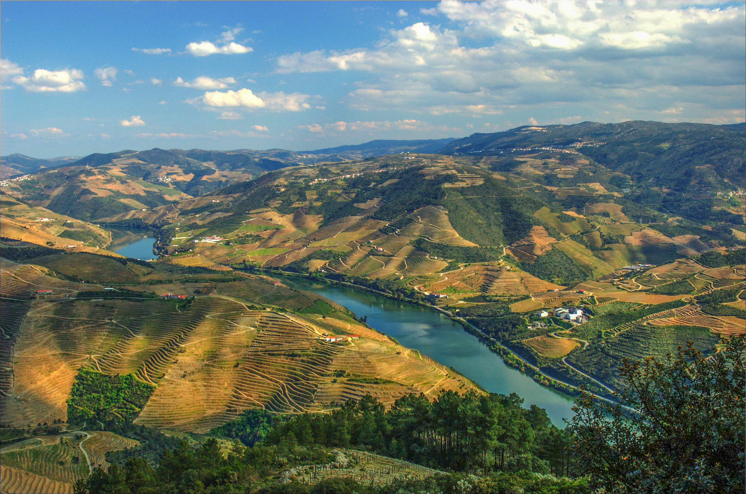 S Leonardo de Galafura